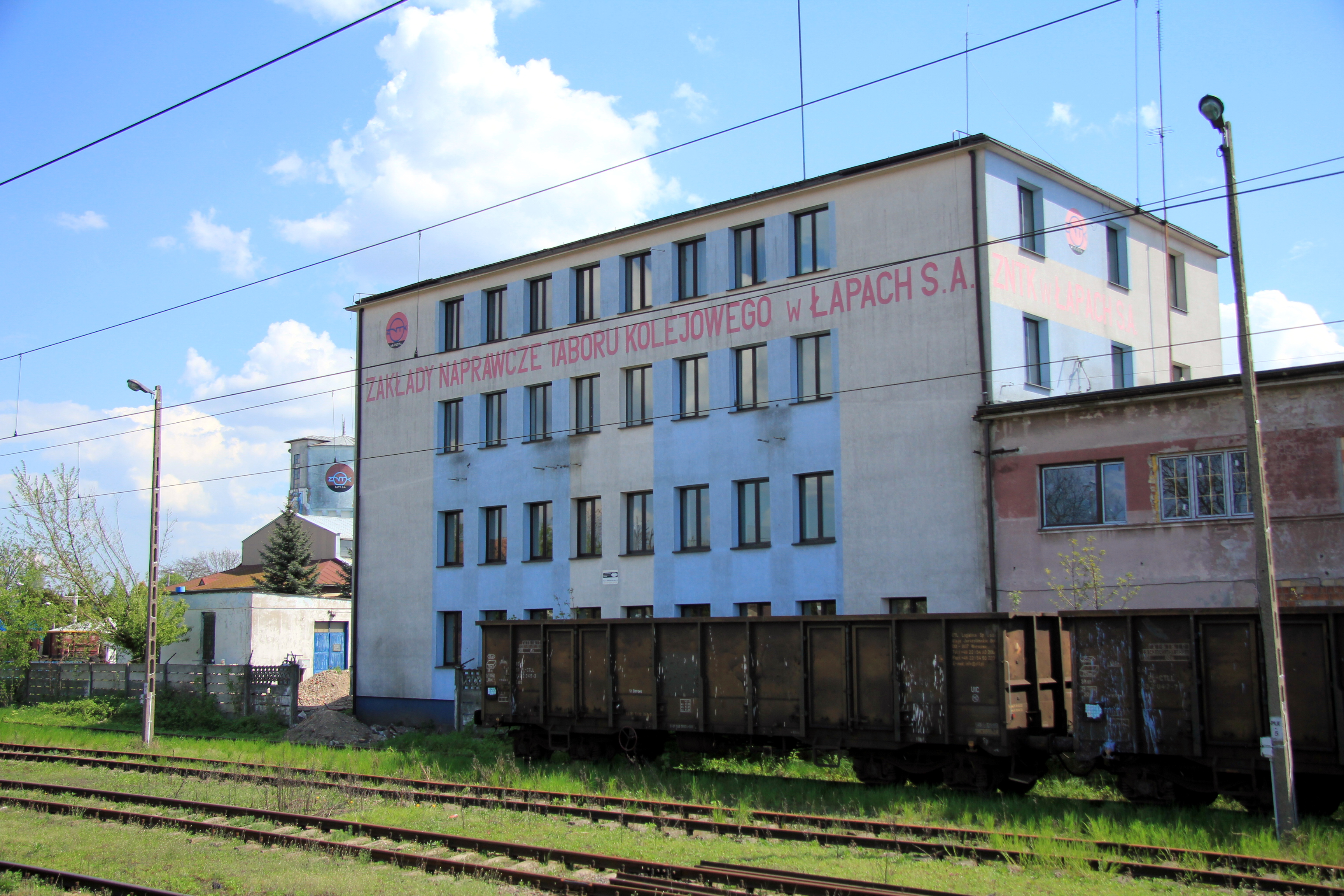 Łapy ZNTK, woj. podlaskie